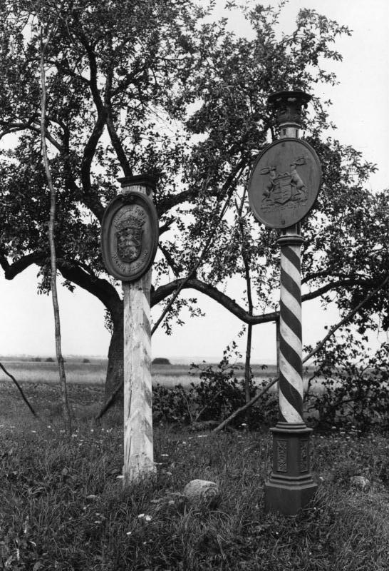 Neckarsulm (Baden-Württemberg) Wegebild zwischen Neckarsulm und Wimpfen, Grenzzeichen von Württemberg und Hessen